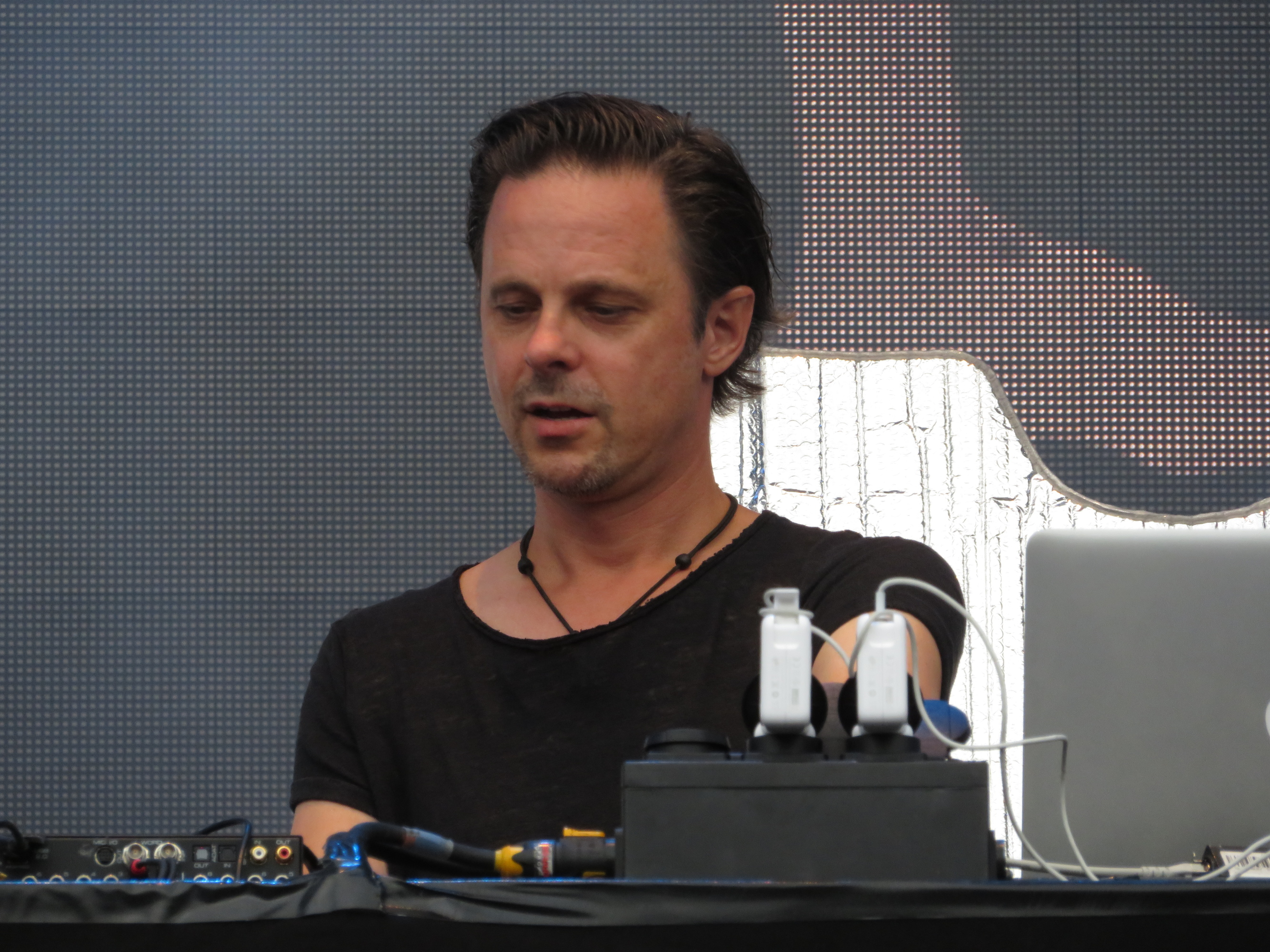 Walter Merziger, Booka Shade, Support-Act für Kraftwerk, 2018-07-20, jazzopen 2018, Schlossplatz Stuttgart